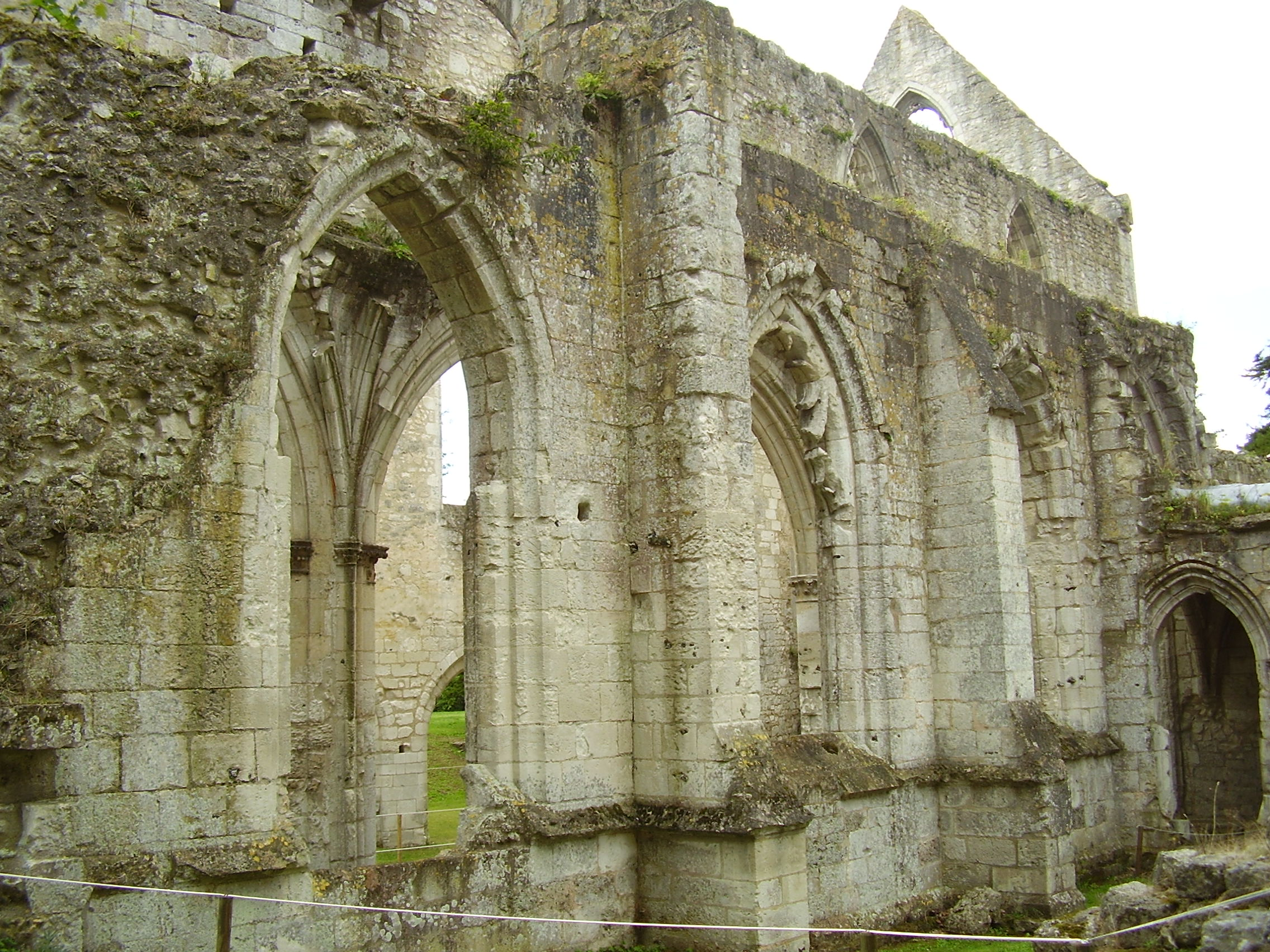 Abbaye de Jumièges, the most beautiful ruins in France